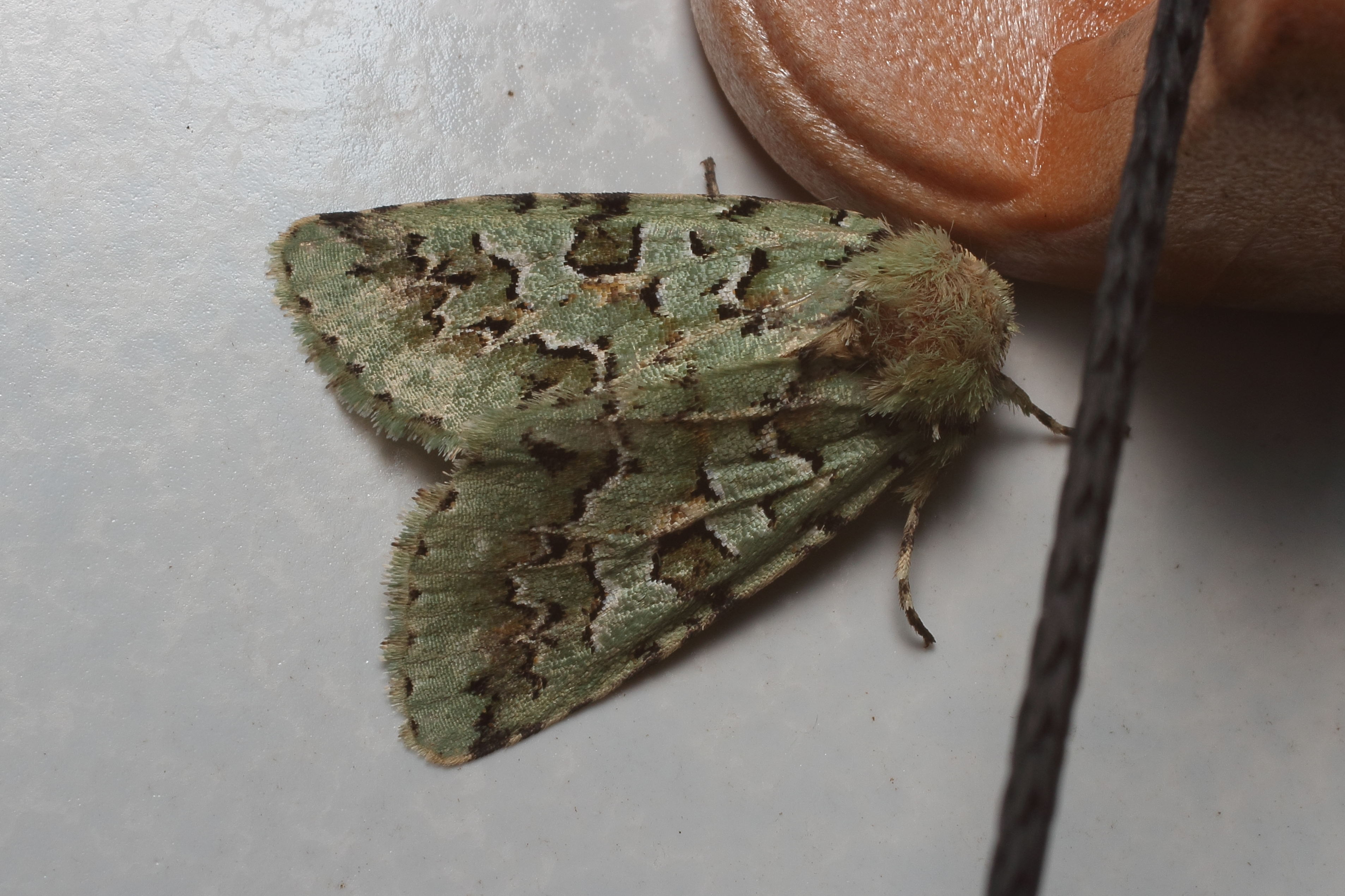 ケンモンミドリキリガ.